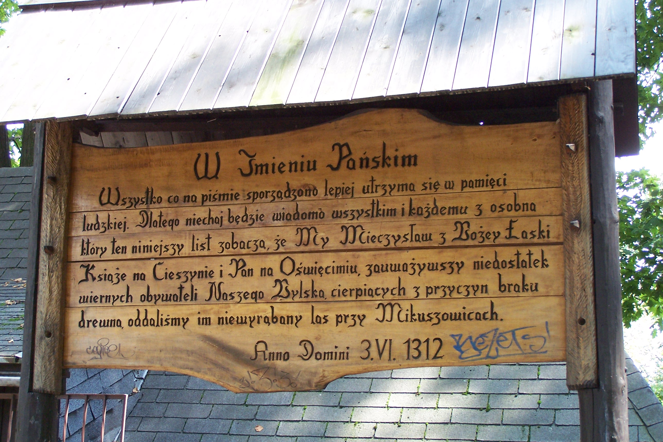 Bielsko-Biała, Cygański Las. Tablica upamiętniająca nadanie w 1312 r., przez Mieszka cieszyńskiego, lasu między Mikuszowicami a Kamienicą (ob. Cygański Las).